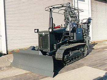 [全長] 4,145～4,290mm（排土板バックホー付き） [全幅] 2,170～2,230mm（排土板バックホー付き） [全高] 2,900～3,030mm（排土板バックホー付き） [全備重量] 3,790～5,130kg（排土板バックホー付き） [走行速度] 前進 2.6～7.3km/h|後進 4.5～6.0km/h [定格出力]29.4kW [最小回転半径]1.6～2.0m [登板能力] 21°（排土板バックホー付き） [接地圧]46kPa [製作]三菱重工業,小松製作所 主として小規模の土木工事に使用し、堀削、排土、整地を行う。また、バックホーを装着し、掩体等の掘削作業を行うことができる。普通科連隊、特科部隊などに装備されている。